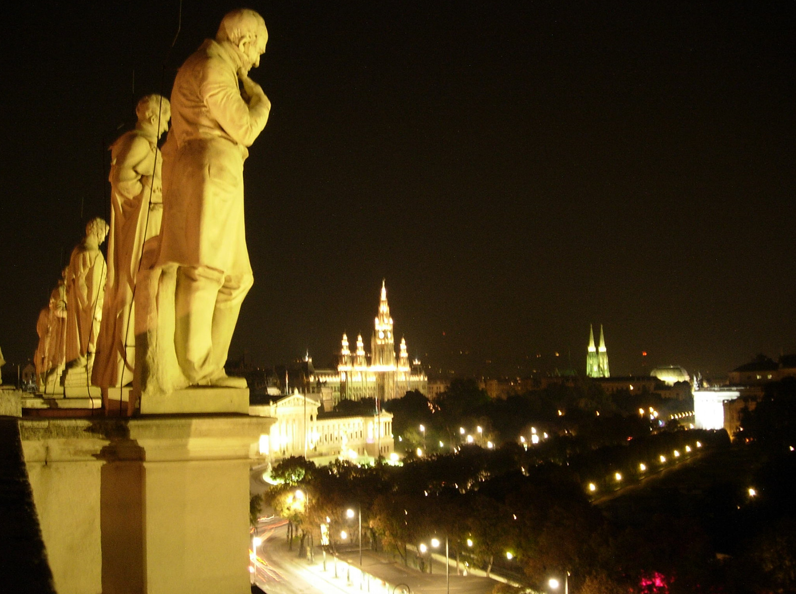 NHM Wien 058